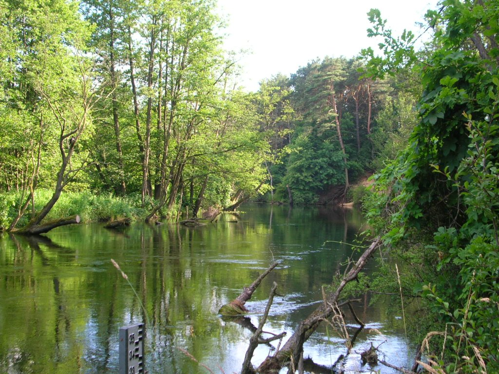 Brda w Bydgoszczy, na osiedlu Opławiec